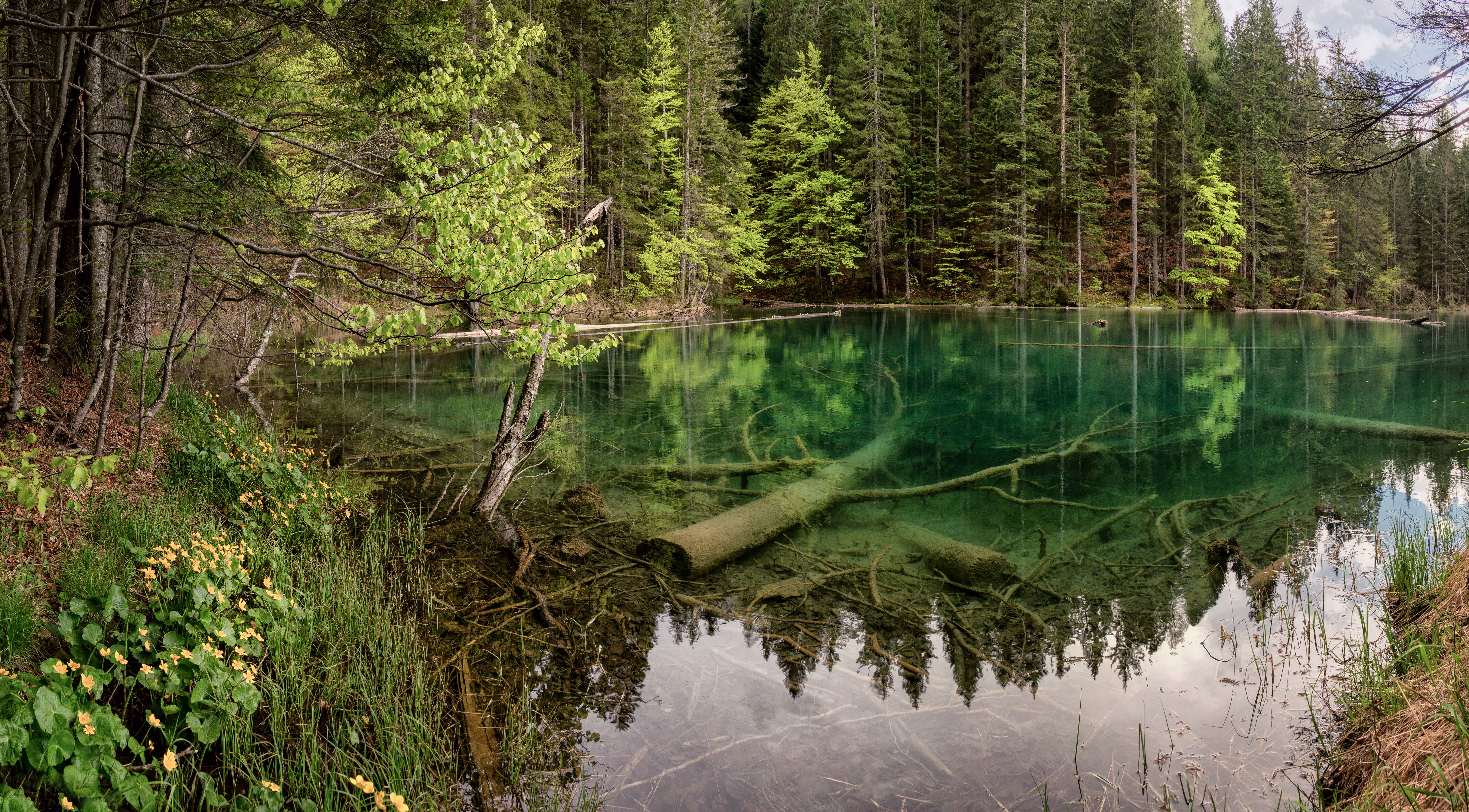 Großer und Kleiner Bodensee Der Große und Kleine Bodensee in der Nähe des Schigebietes Nassfeld sind gekennzeichnet durch die smaradblaue Färbung und den hineingestürzten Bäumen. Die Seen sind durch ein Sumpfgebiet voneinander getrennt, welches auch zum Schutzgebiet gehört. Hier am Bild ist der Große Bodensee (ca. 0,61 ha) zu sehen. This media shows the natural monument in Carinthia with the ID He 10.